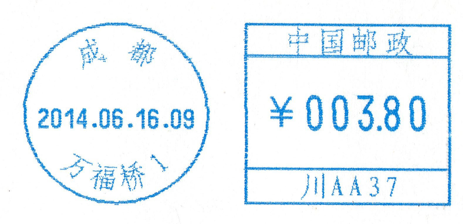 2014年6月16日 成都万福桥邮资符志